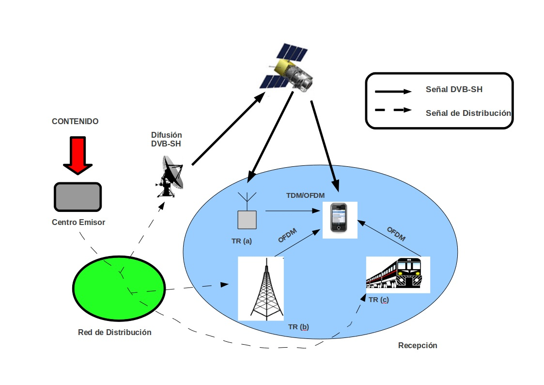 Arquitectura del estandar DVB-SH (Digital Video Broadcasting Satellite to Handheld Devices)